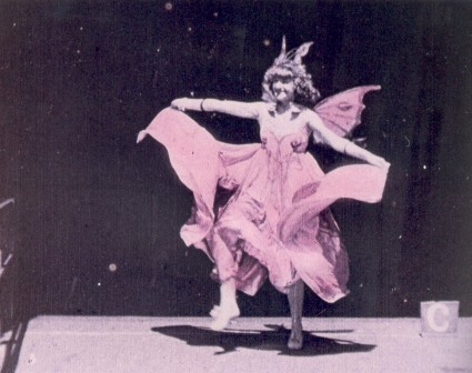 Die Tänzerin Annabelle Whitford bei einer Vorführung ihrer Schmetterling-Tanzes; Aufgenommen in Edisons Black Maria-Filmstudio